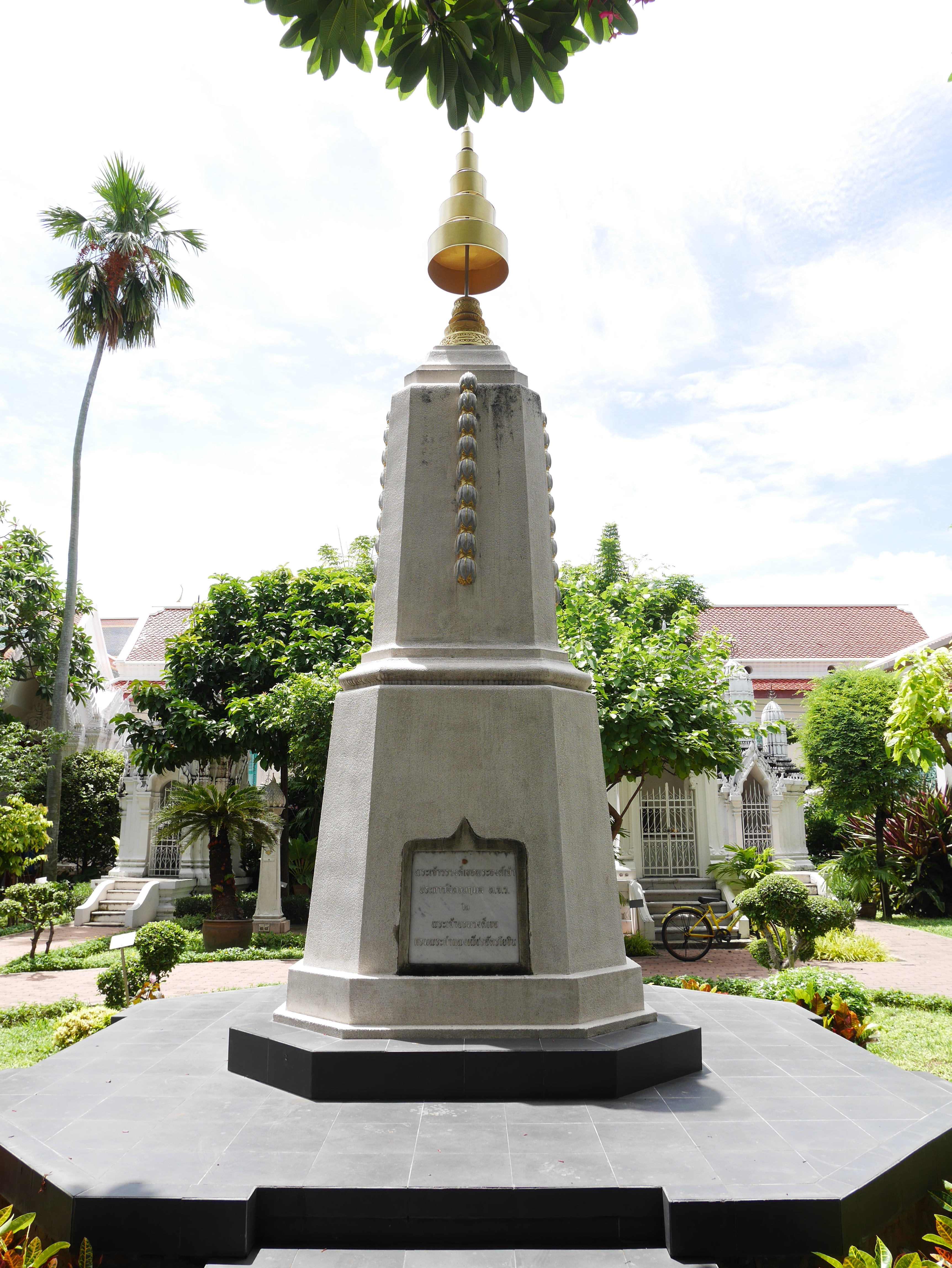 วัดราชบพิธ